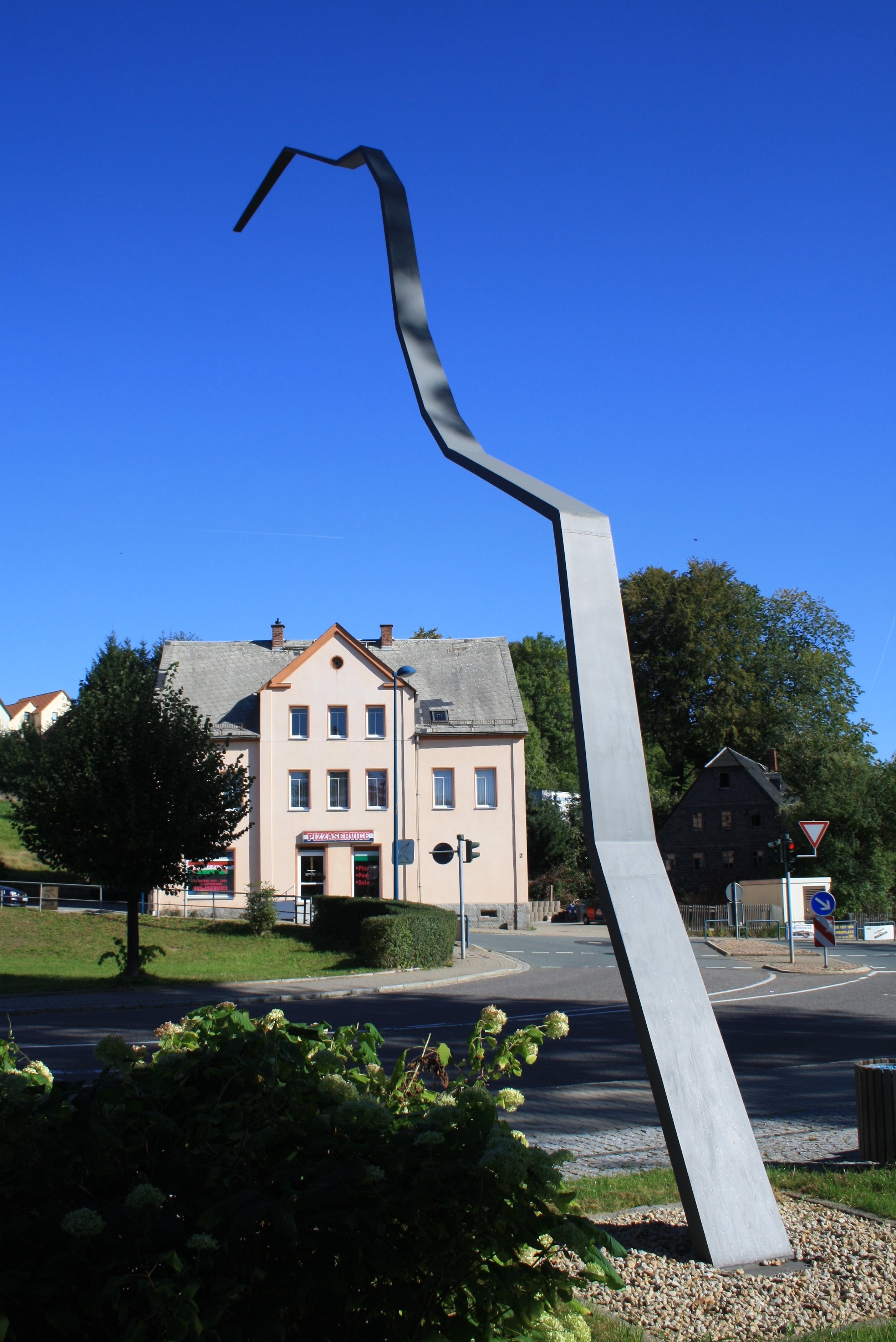 "Raum-Zeit-Diagramm".Skulptur in Oelsnitz. Erzgebirgskreis. Sachsen.